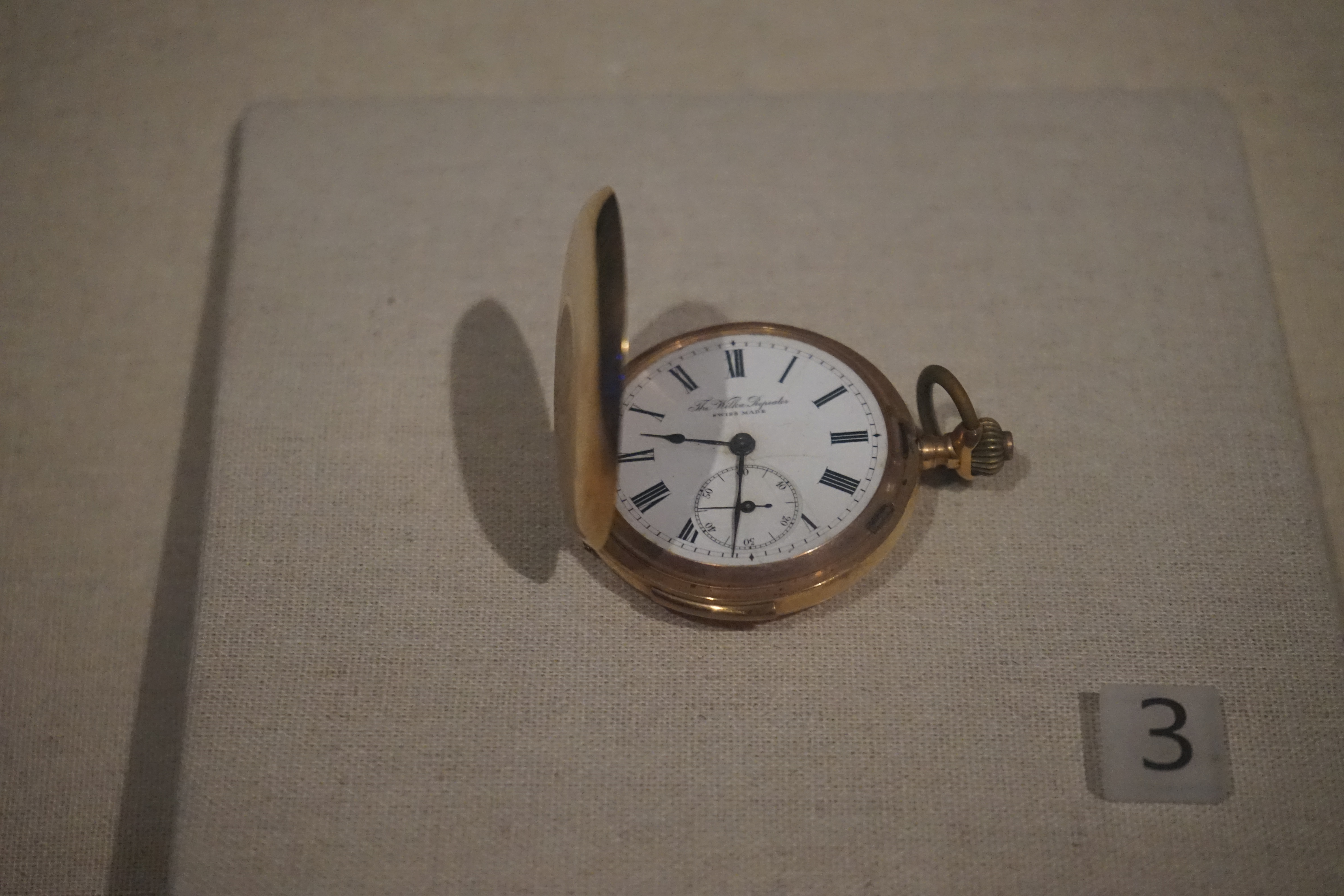 中文（中国大陆）: 朱瑞指挥作战使用的怀表。一级文物。